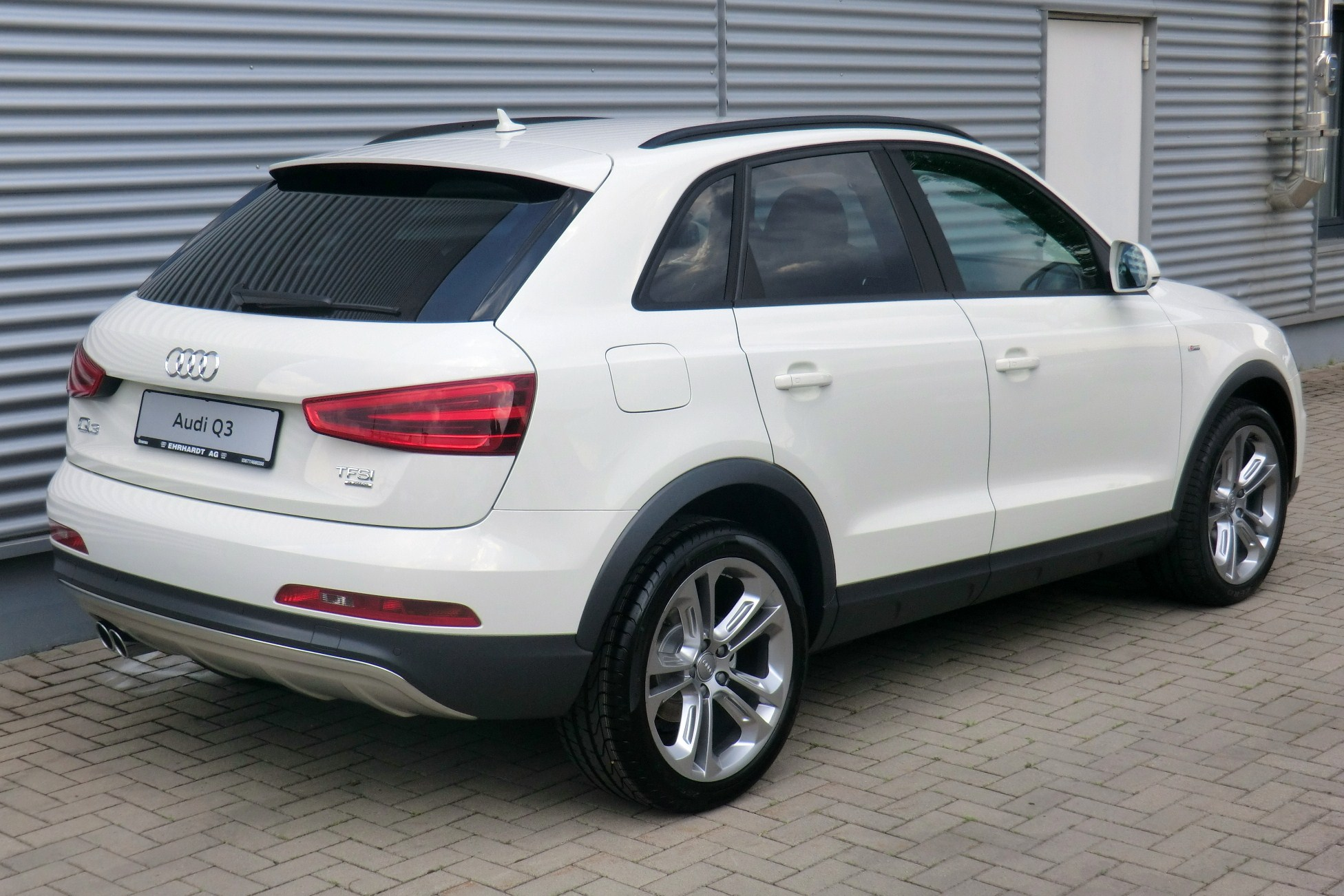 Audi Q3